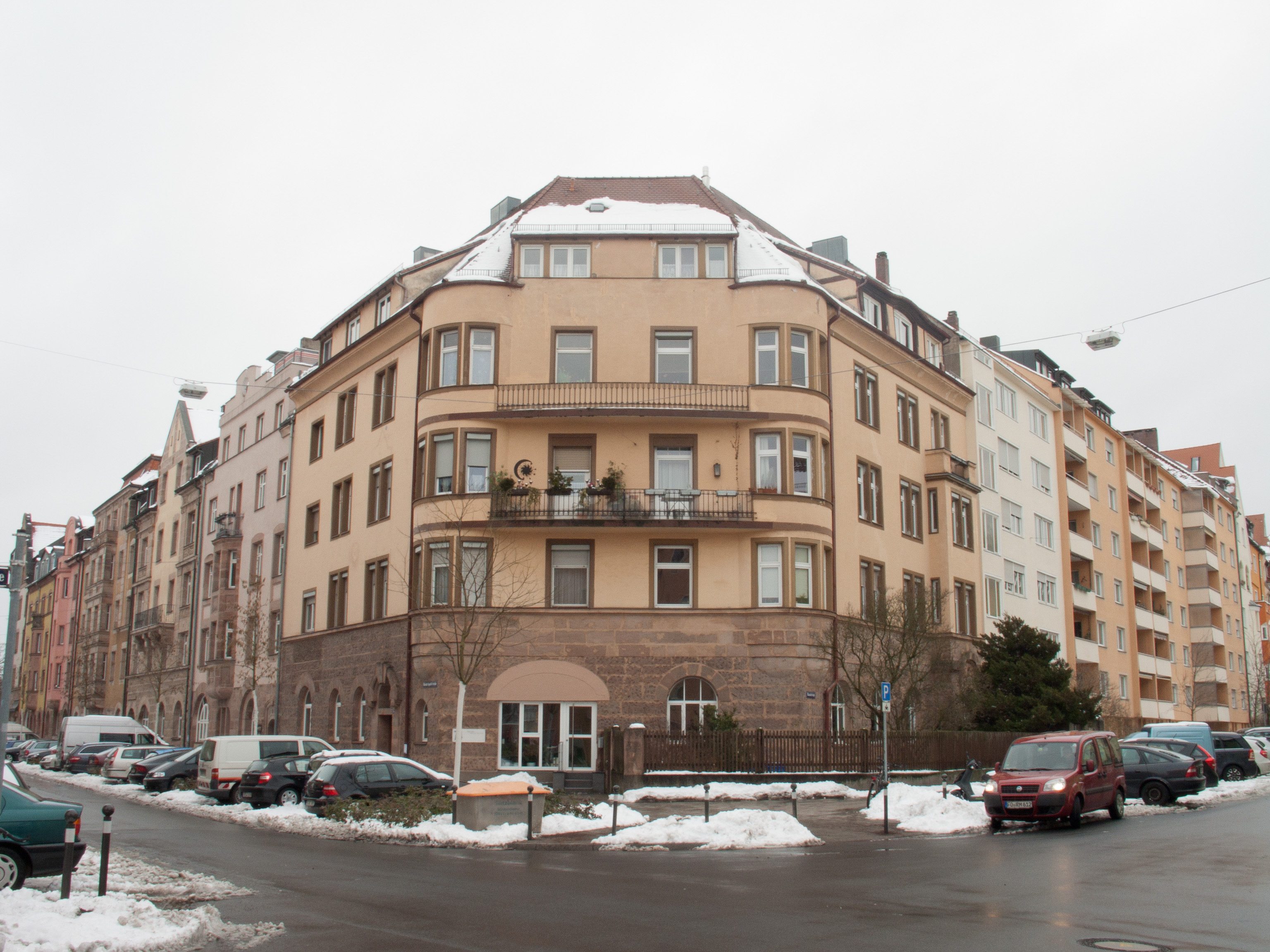 Nürnberg, Gmkg. Gleißhammer, Bleiweiß. Wohnhaus Wilhelm-Spaeth-Str. 74. Ansicht gegen Südosten.